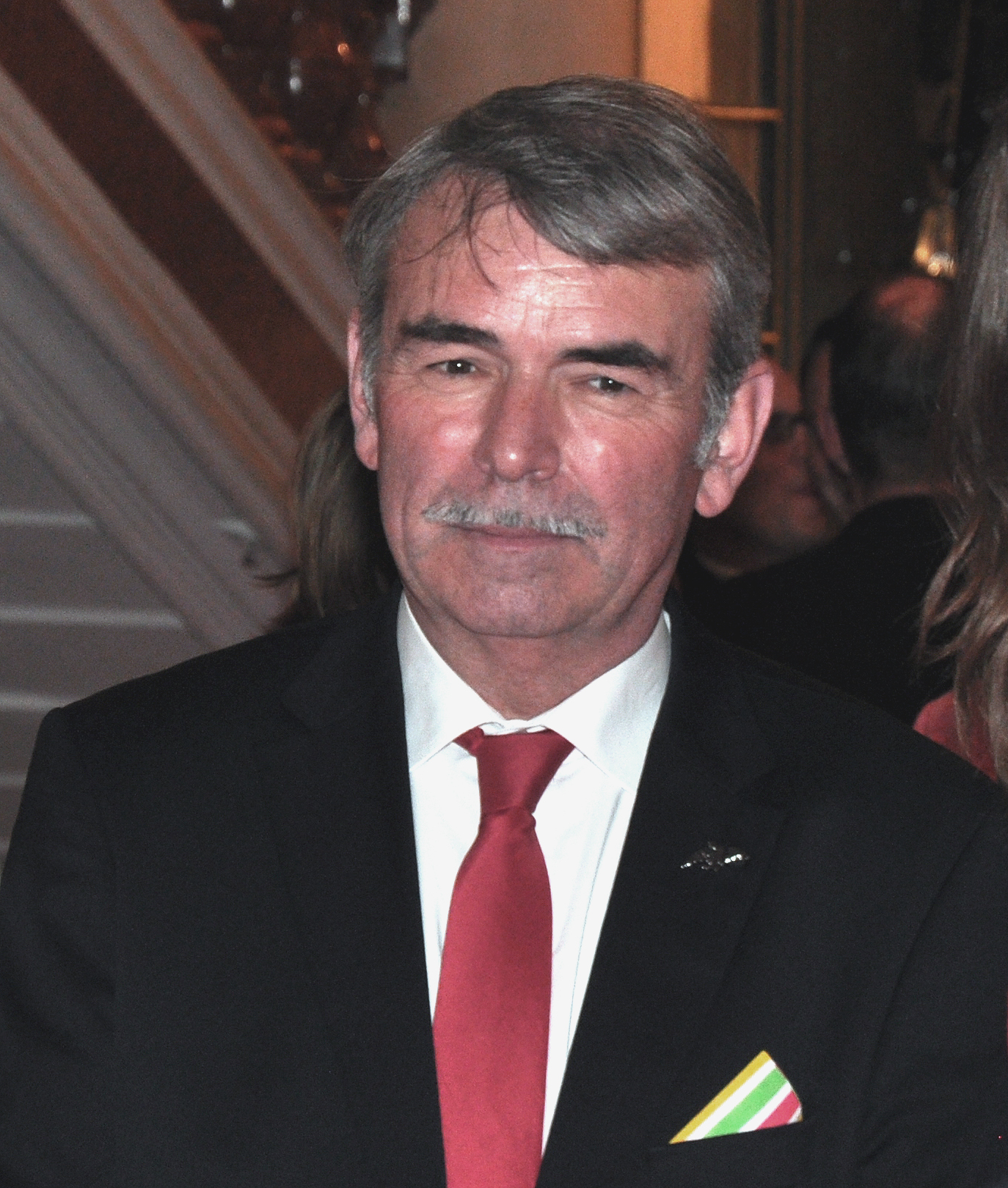 Gustl Mollath bei der Eröffnungs-Party des 33. Münchner Filmfestes im Hotel Bayerischer Hof anlässlich des Films: "Und plötzlich bist Du verrückt"